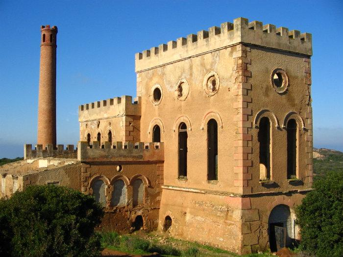 Sa Macchina Beccia - Pozzo Santa Barbara, Iglesias